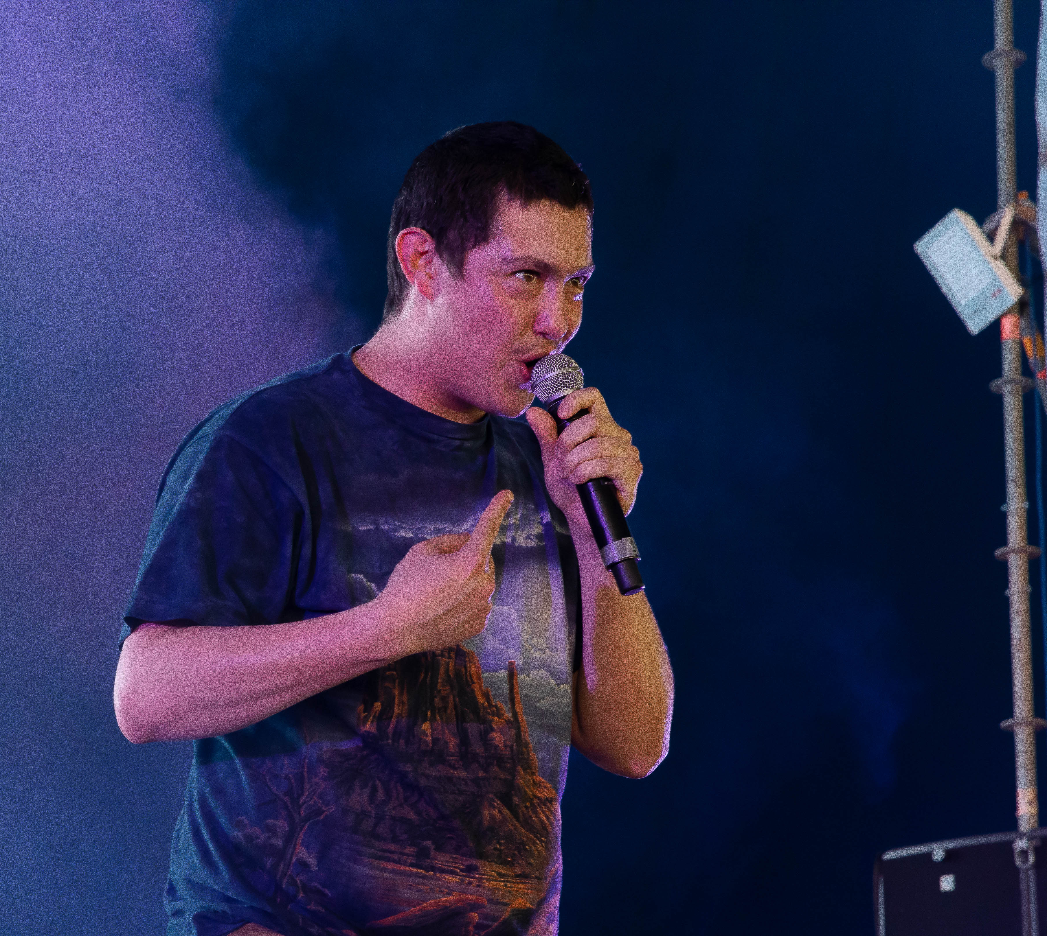 Hobo Johnson